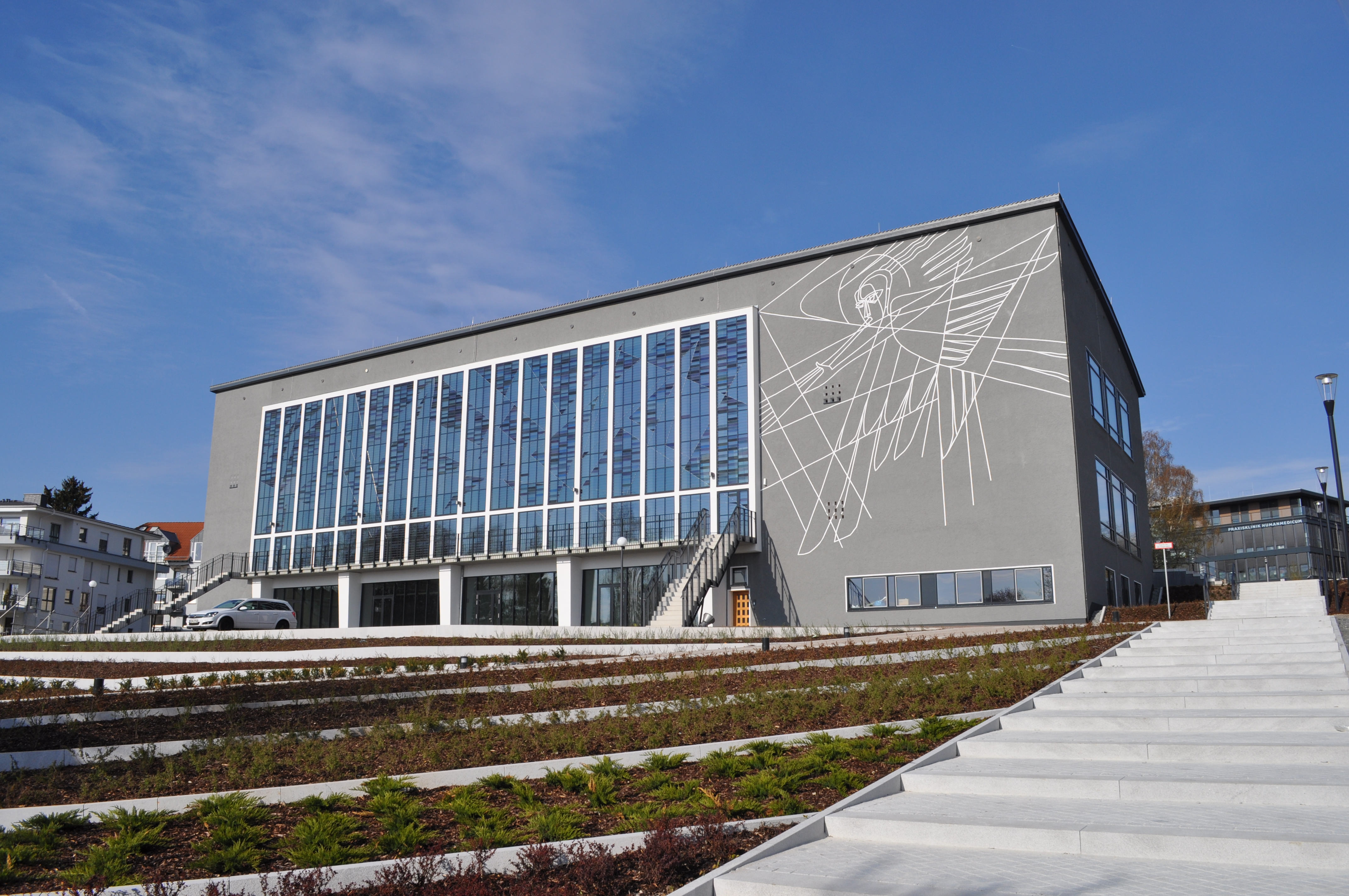 Königstein, Haus der Begegnung nach der Sanierung